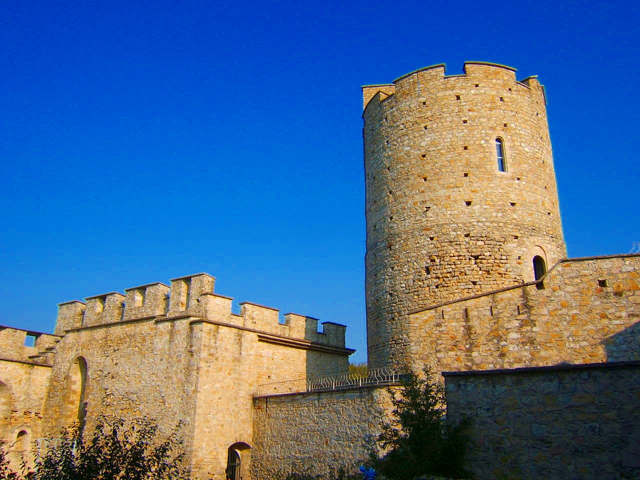 Château de Fallavier (France), le donjon